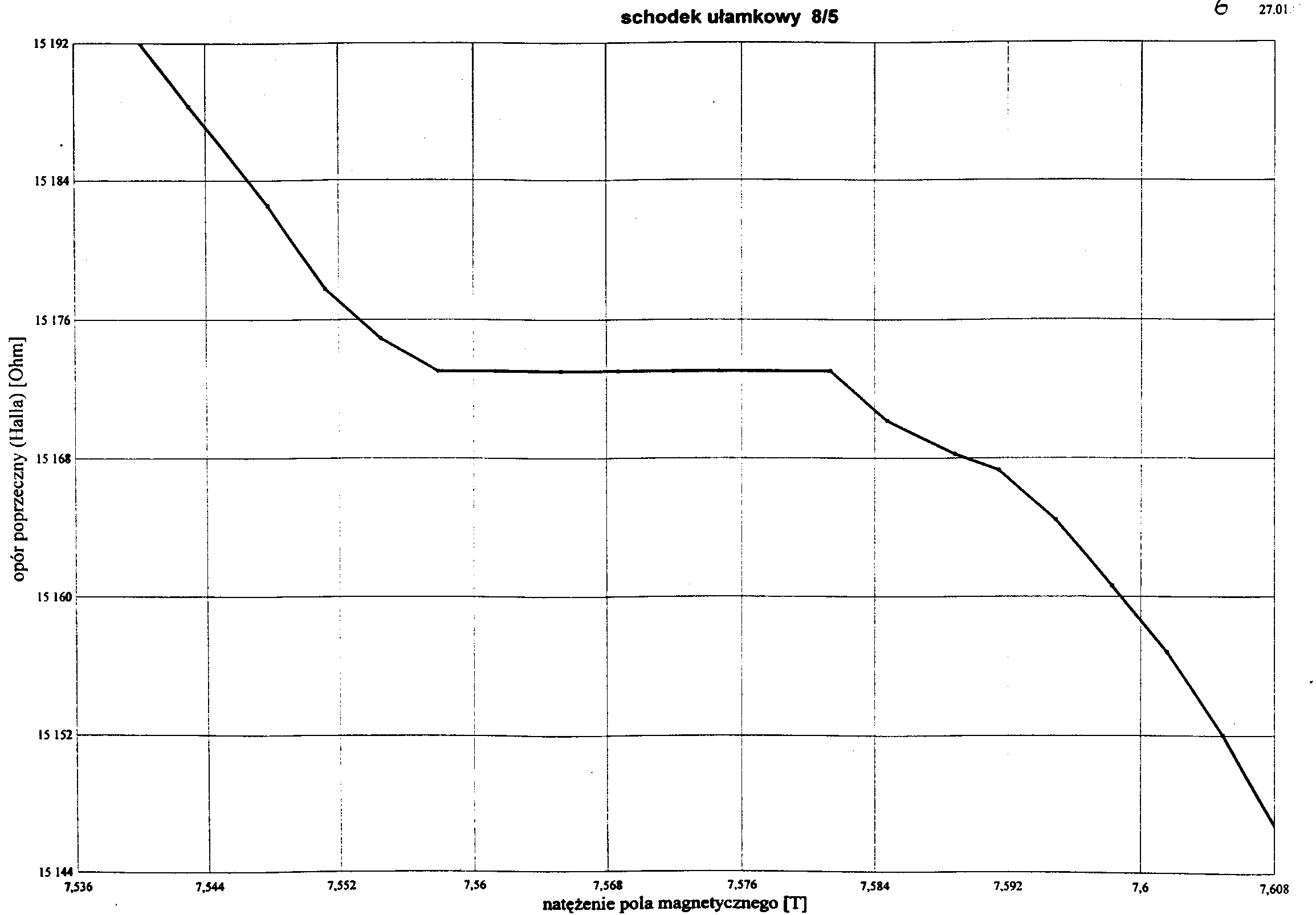 Ułamkowy Kwantowy Efekt Halla (FQHE). Widoczny "schodek" ułamkowy 8/5. Pomiary wykonane w Instytucie Fizyki PAN we Warszawie al. Lotników w dniu 27.01.2000